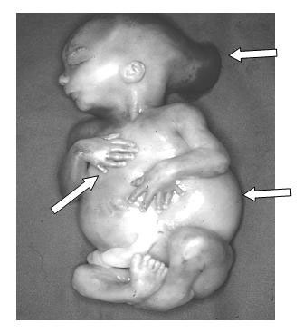 Клинические симптомы синдрома Меккель-Грубера